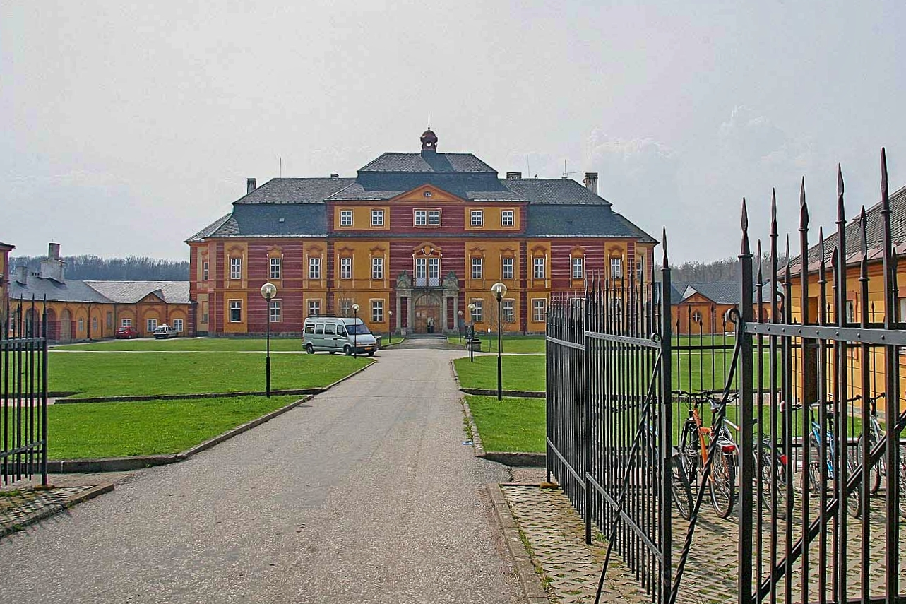 Zámek v obci Chroustovice, okres Chrudim.